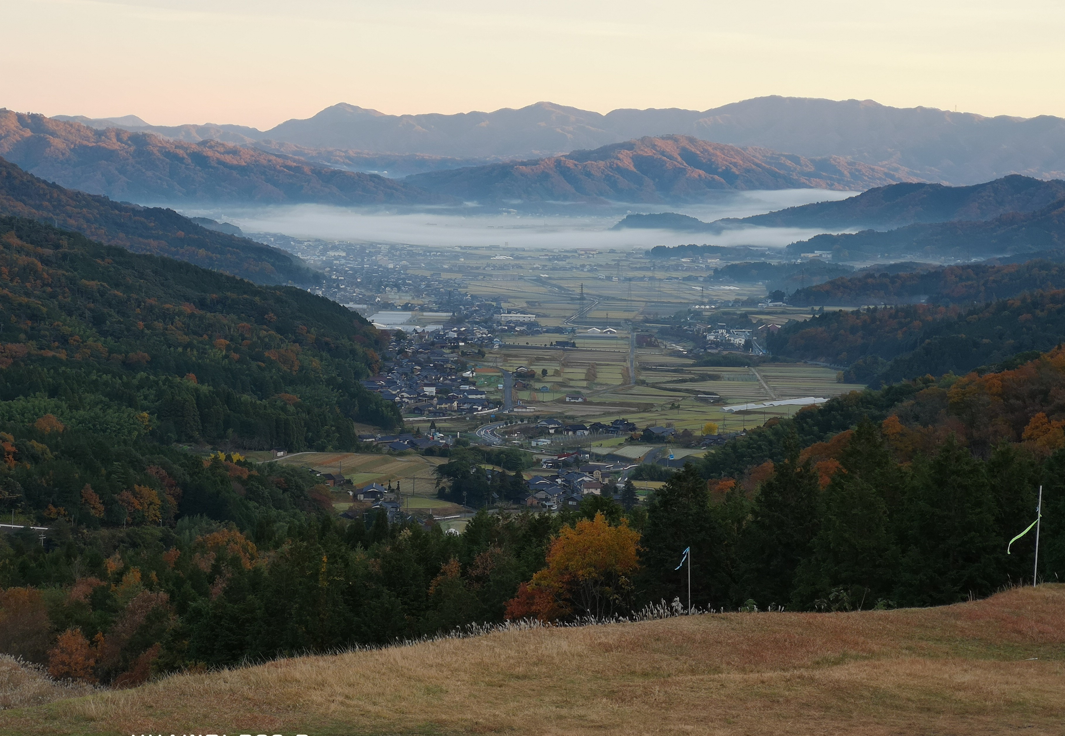 京都府与謝郡与謝野町 大江山連峰を右手に臨む与謝峠中腹から見た与謝野町。